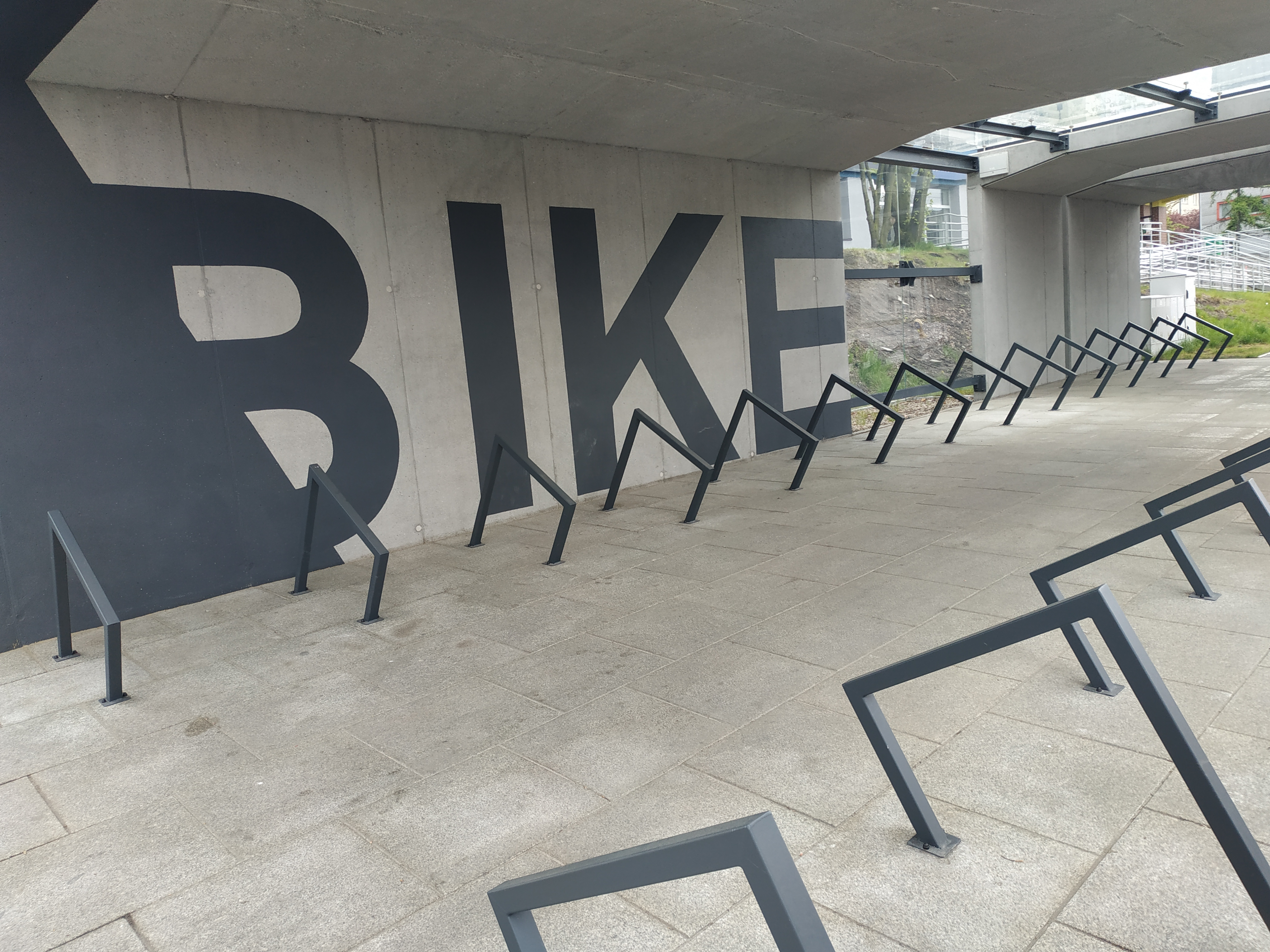 Parking rowerowy przy CP Ligota